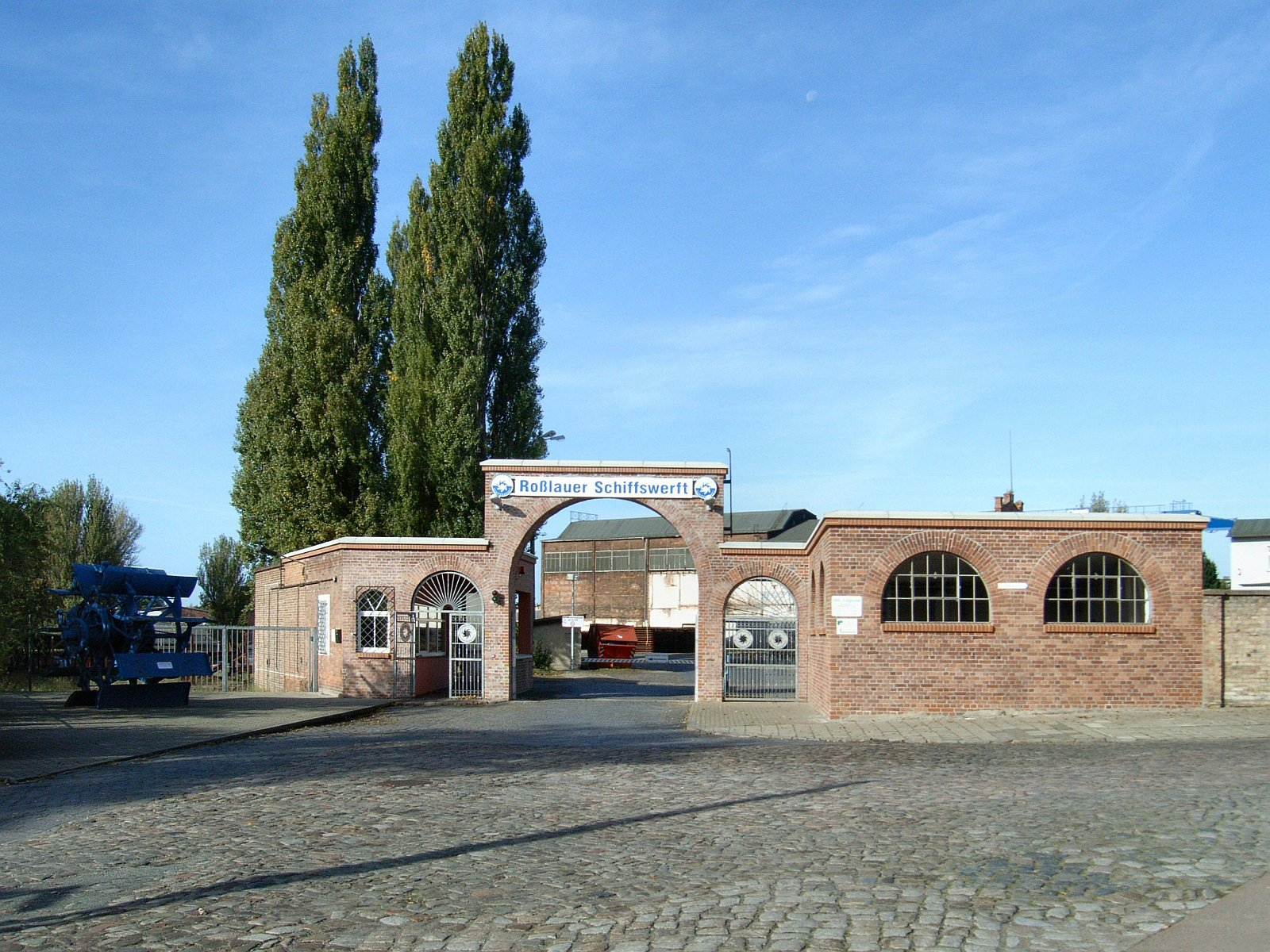 Roßlauer Schiffswerft, Exzenterschaufelrad